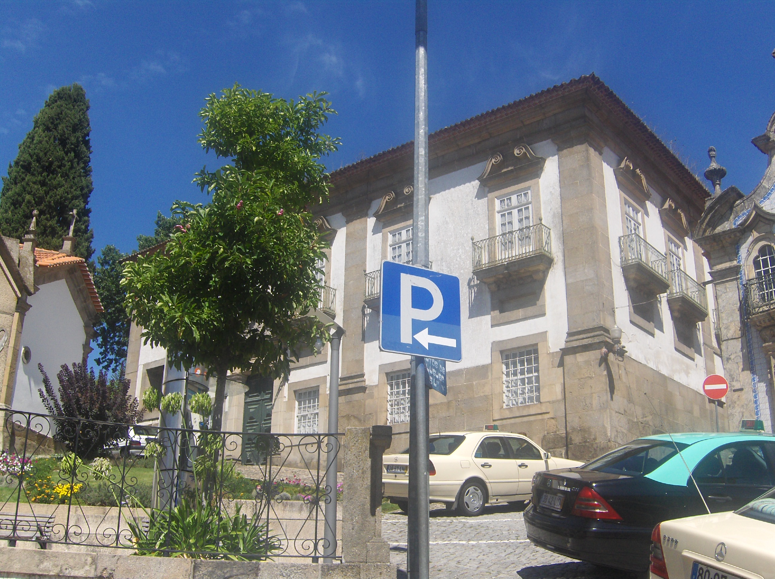 Palácio de Reriz, Sul, Viseu, Portugal. Palácio do barroco, património do actual Marquês de Reriz.